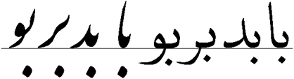 Сочетания букв в арабском письме, подвергнутые керингу